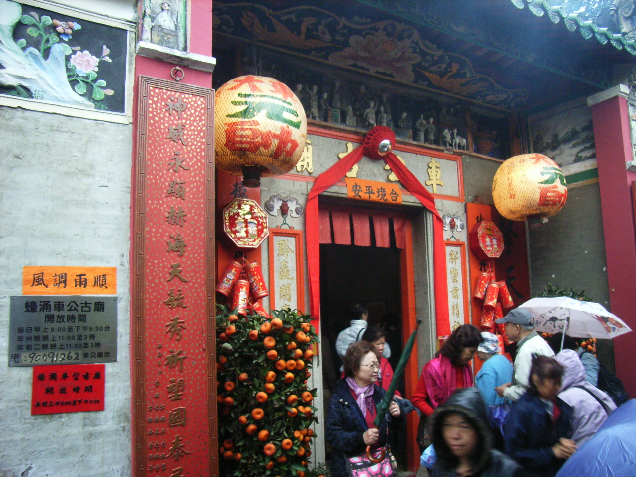 蠔涌車公廟 又名 車公古廟，是一座zh:中國特色的古舊zh:廟宇，此zh:車公廟有300多年歷史。 蠔涌車公廟位於zh:香港zh:西貢區zh:蠔涌，蠔涌河及zh:蠔涌路以北，蠔涌新村以東，亞洲電視zh:建築物以東。 蠔涌車公廟主要供奉之zh:神仙是zh:車公，它是zh:宋朝的大將軍，曾經平定zh:華南某場zh:戰爭zh:叛亂，道教人士奉之為神靈。